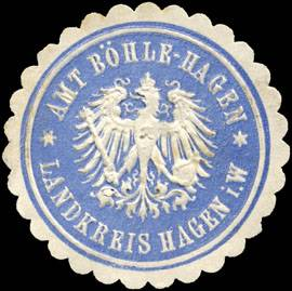 Sealing stamp Title: Amt Böhle-Hagen – Landkreis Hagen i. W. Description: hellblau, weiß, geprägt Place: Böhle-Hagen size: 3 cm